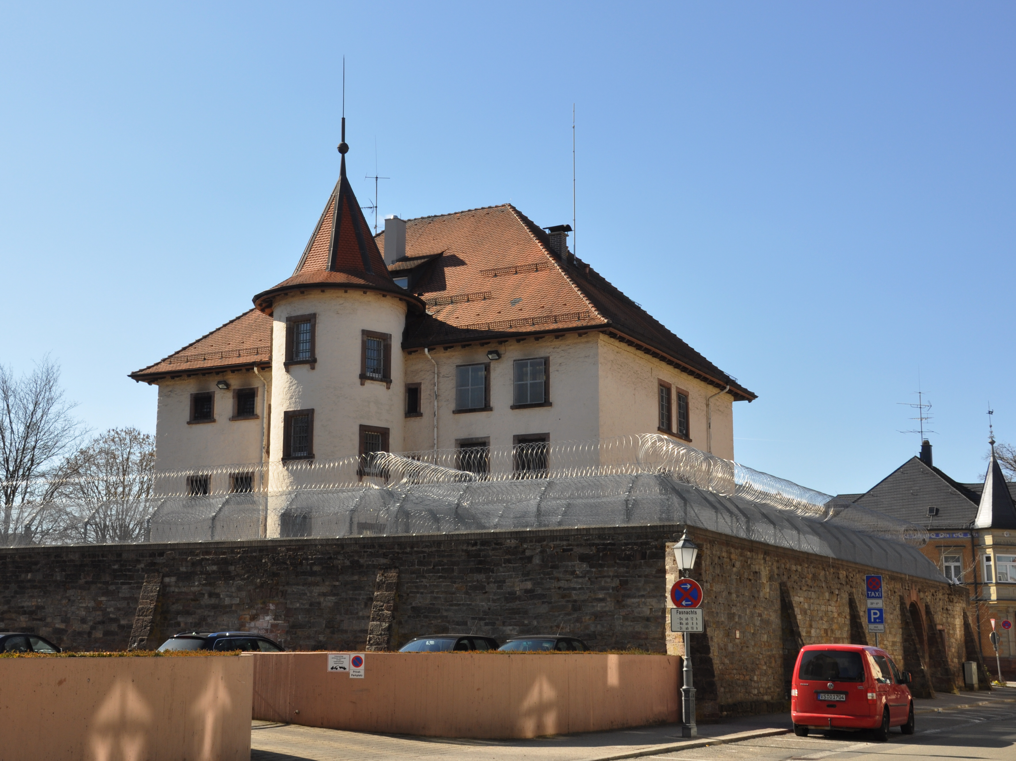 Villingen-Schwenningen, Stadtbezirk Villingen Justizvollzugsanstalt Rottweil, Außenstelle Villingen